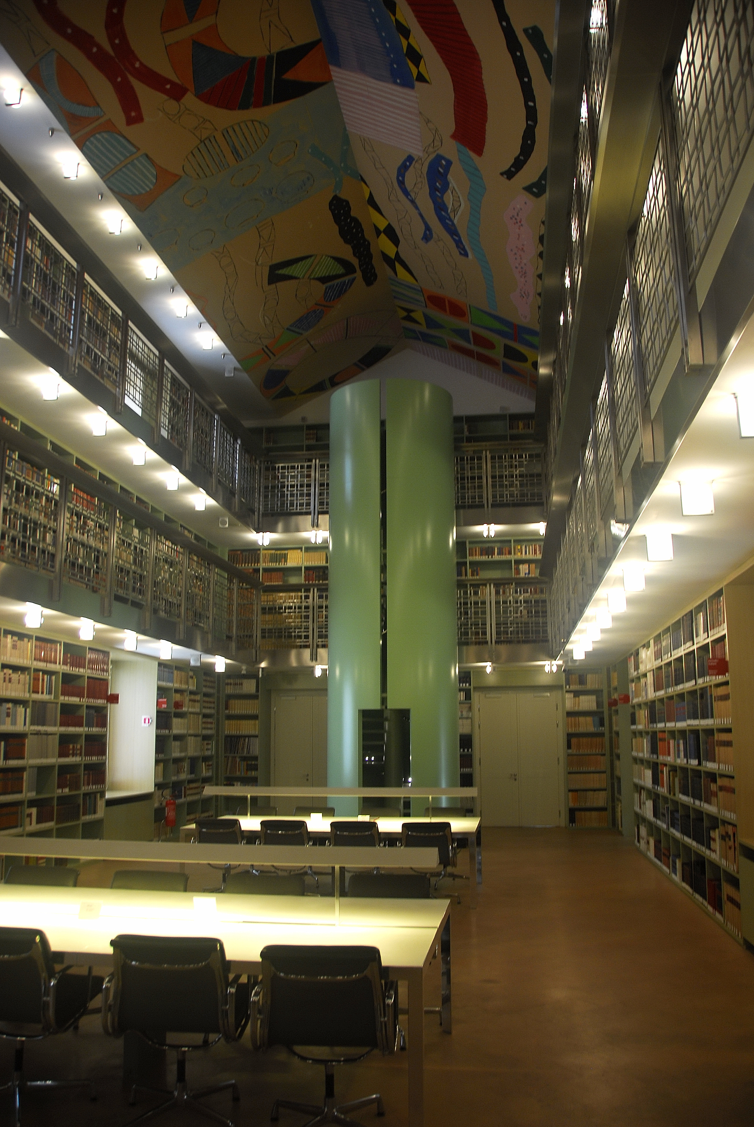 Palermo, ITA